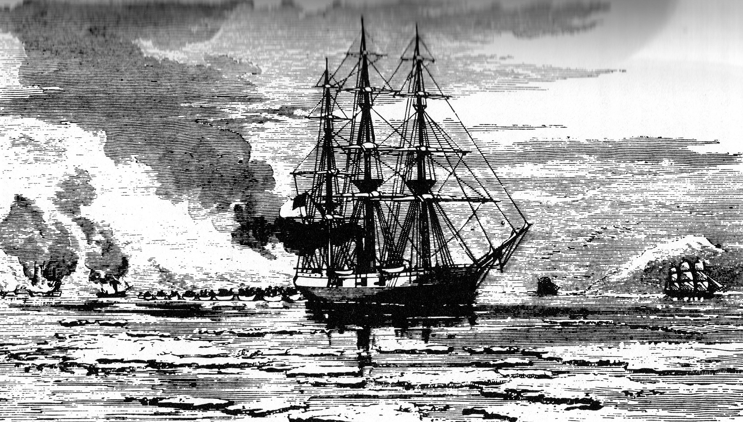 CSS Shenandoah am 25. Juni 1865 in der Behringstraße. Der konföderierte Handelszerstörer schleppt Boote mit den Besatzungen von drei verbrannten Prisen, die im Hintergrund links zu erkennen sind